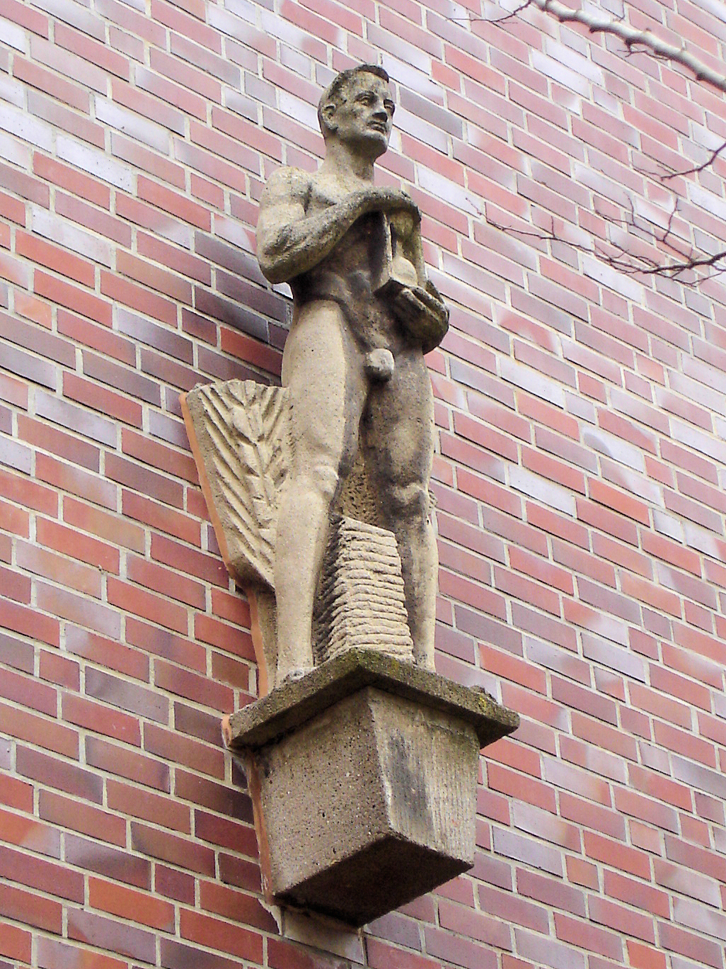 Allegorische Figur Kunststein Hansakino Maßmannstraße in Rostock (Maximilian Preibisch 1937)